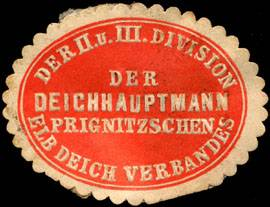 Sealing stamp Title: Der Deichhauptmann Prignitzschen Elbdeich Verbandes der II. und III. Division Description: rot, weiß, geprägt Place: size: 3x4 cm